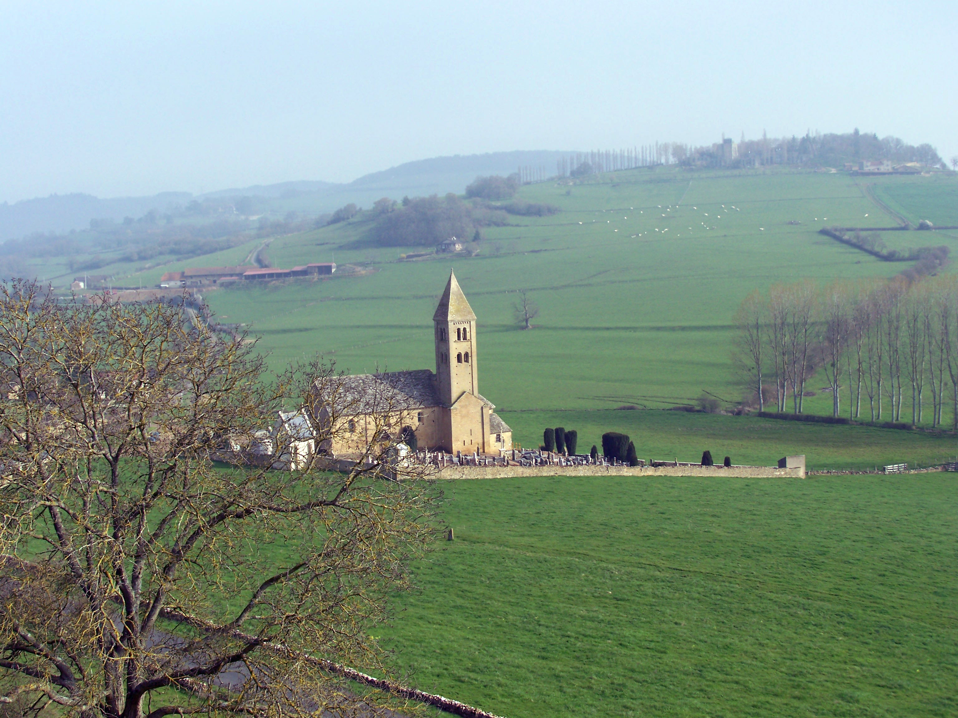 Mazille, commune de Saône et Loire, et son église, située à 5 km de Cluny, au petit matin.